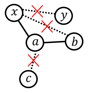 タットの定理の証明に現れる状況の図示。